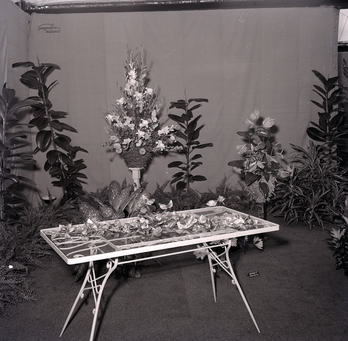 Servizio fotografico : Milano, 1954 / Paolo Monti. - Buste: 6, Fototipi: 6 : Negativo b/n, gelatina bromuro d'argento/ pellicola ; 6x6. - ((Serie costituita da 18 negativi identificati con i nn.: 23771-23776. Sulla busta R23771 manoscritto: "X Trienn." Numerazione parallela: 1166-1171.La suddetta serie è contenuta nella scatola identificata con la numerazione 23214/23808. Sulla scatola manoscritto con pennarello nero: "Design e arte moderna". - Occasione: Documentazione della X Triennale del 1954, intitolata "Prefabbricazione - Industrial Design: Esposizione Internazionale delle Arti Decorative e Industriali Moderne e dell'Architettura Moderna". L'esposizione si tenne presso il Palazzo dell'Arte. - : IV . Commesse/ Fattura n. 32/ Fotografie d'archivio per volume sulla Triennale di Milano (1977/11/28), presso Archivio Paolo Monti. n. 15 fotografie decime Triennale di Milano 1954. - Fonte: Fattura di Paolo Monti